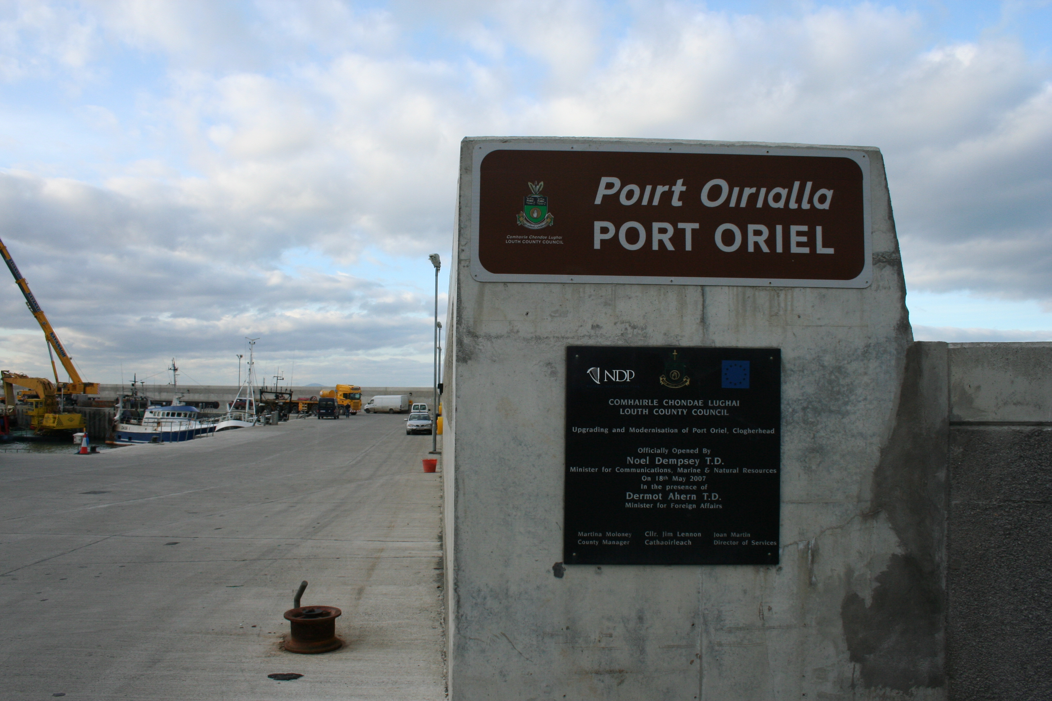 Port sign, plaque, Port Oriel